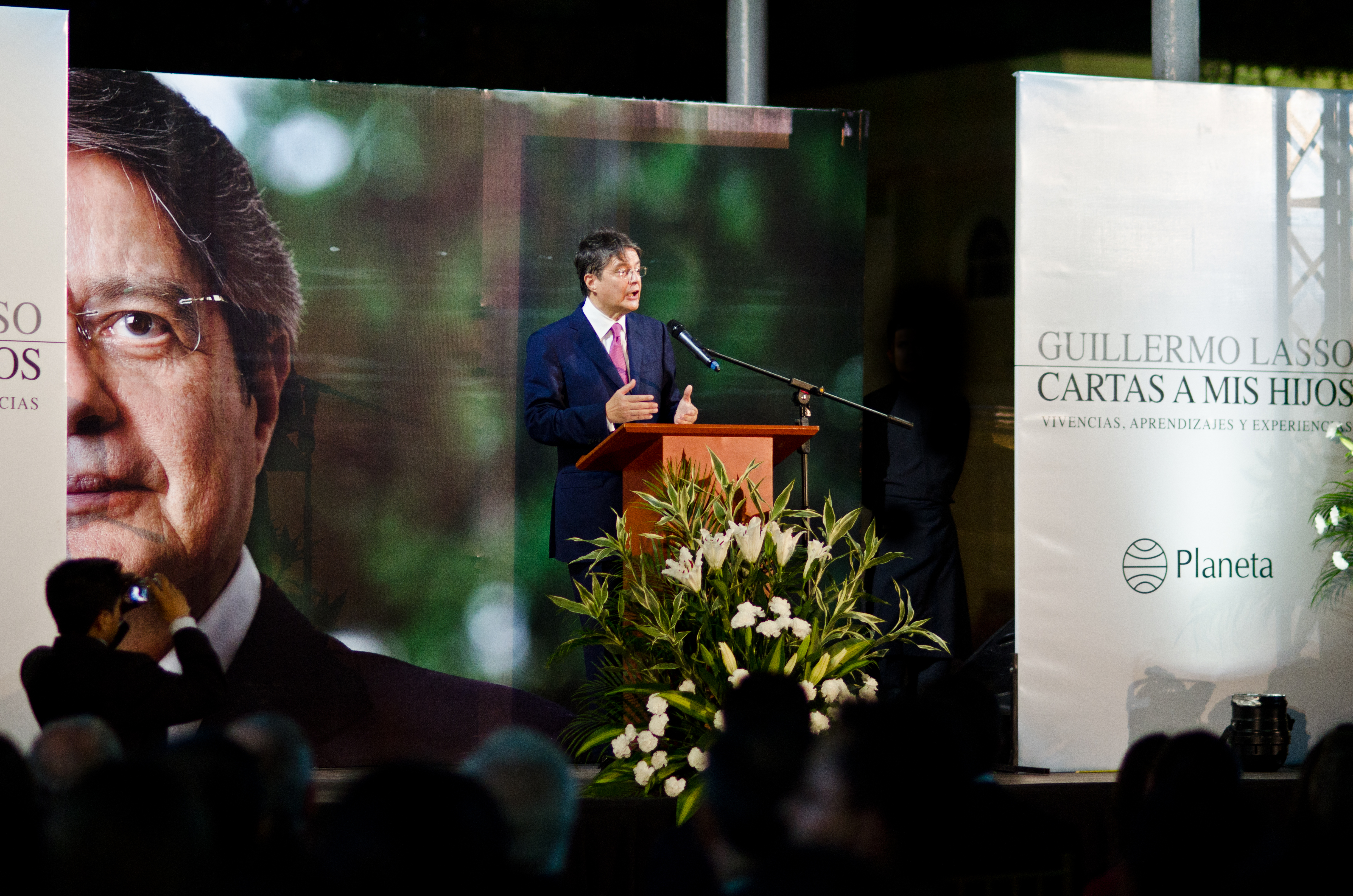 Guillermo Lasso en la presentación del libro Cartas a mis Hijos